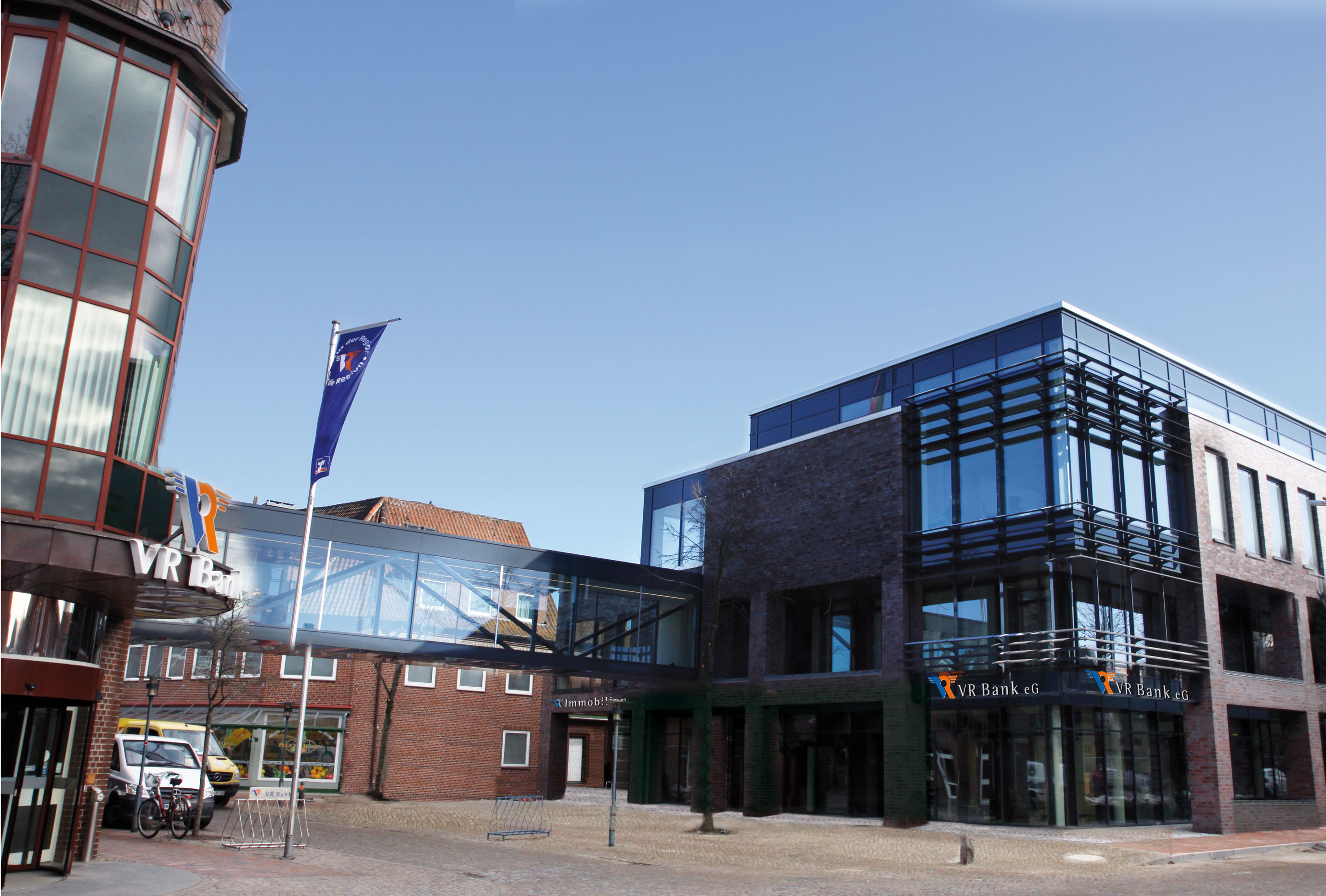 Neubau der VR Bank eG in Niebüll, Hauptstraße 30, 25899 Niebüll, Deutschland